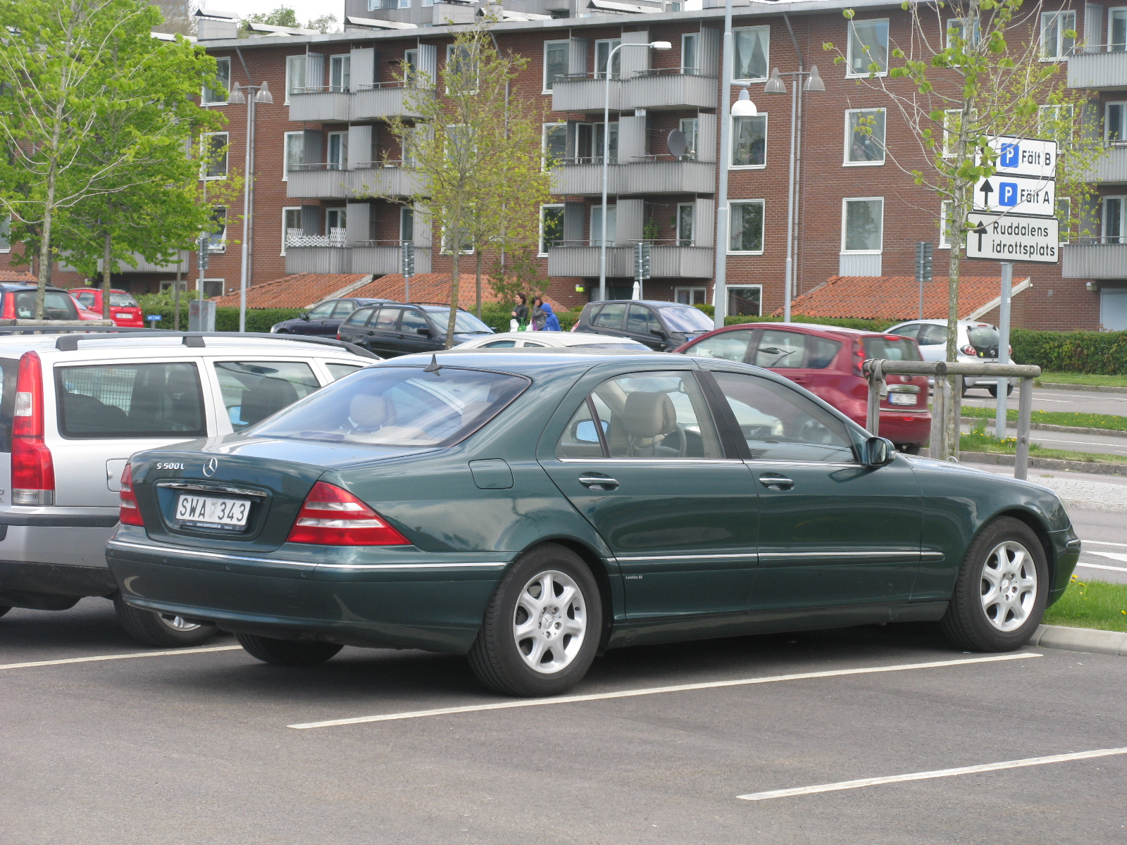 Mercedes-Benz S500 L W220